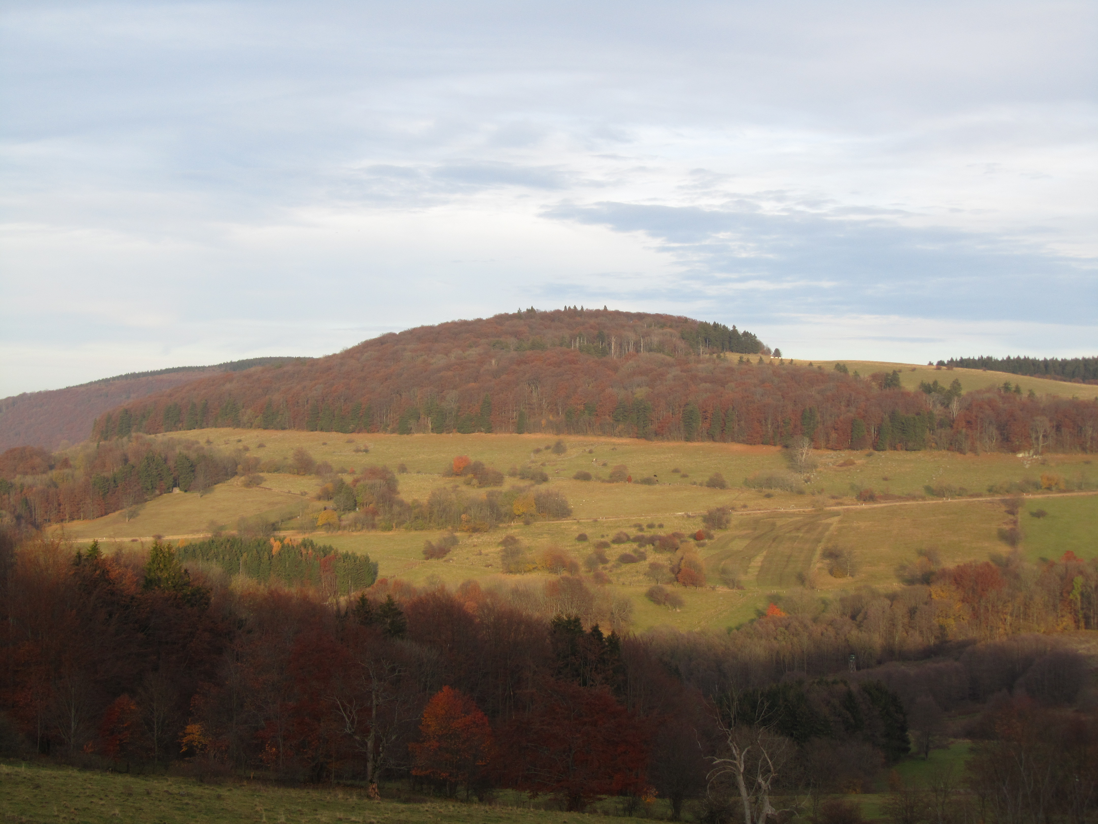 Der Steinkopf (888 m) in der Rhön von Westen